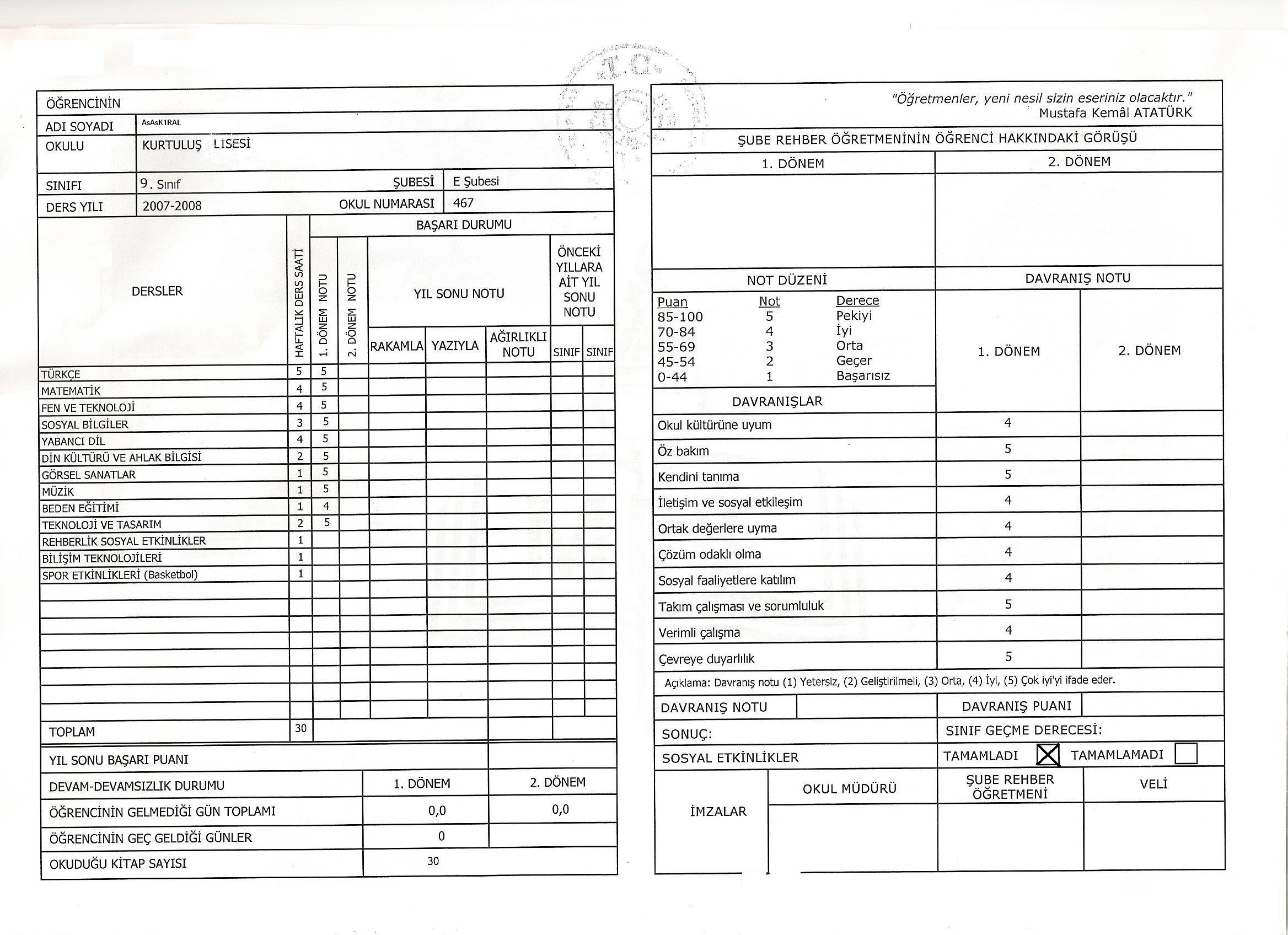 Karnenin iç yüzü